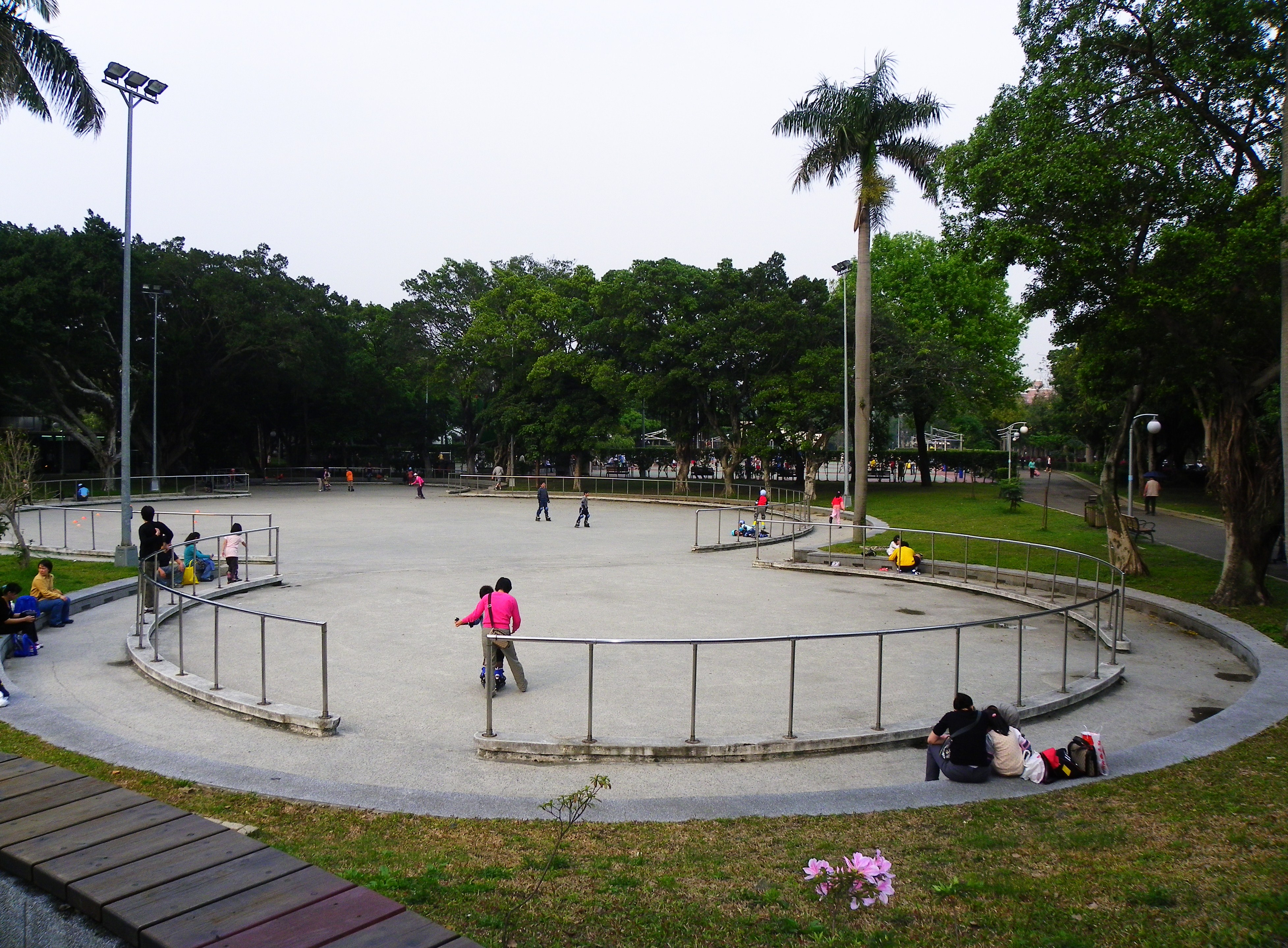 中文（台灣）: 臺北市青年公園南部的輪式溜冰場。